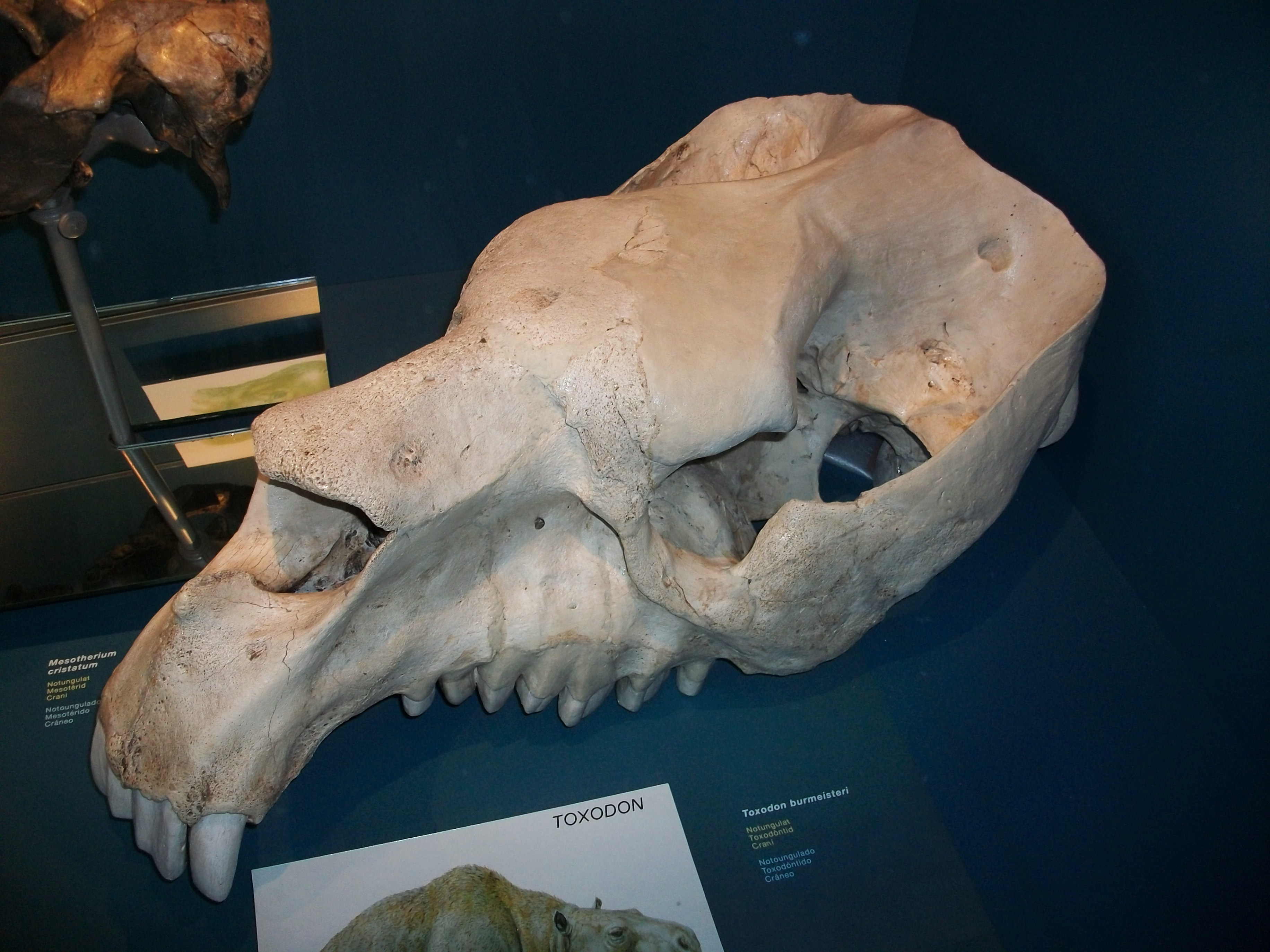 Crani de Toxodon al Museu de Ciències Naturals de València.